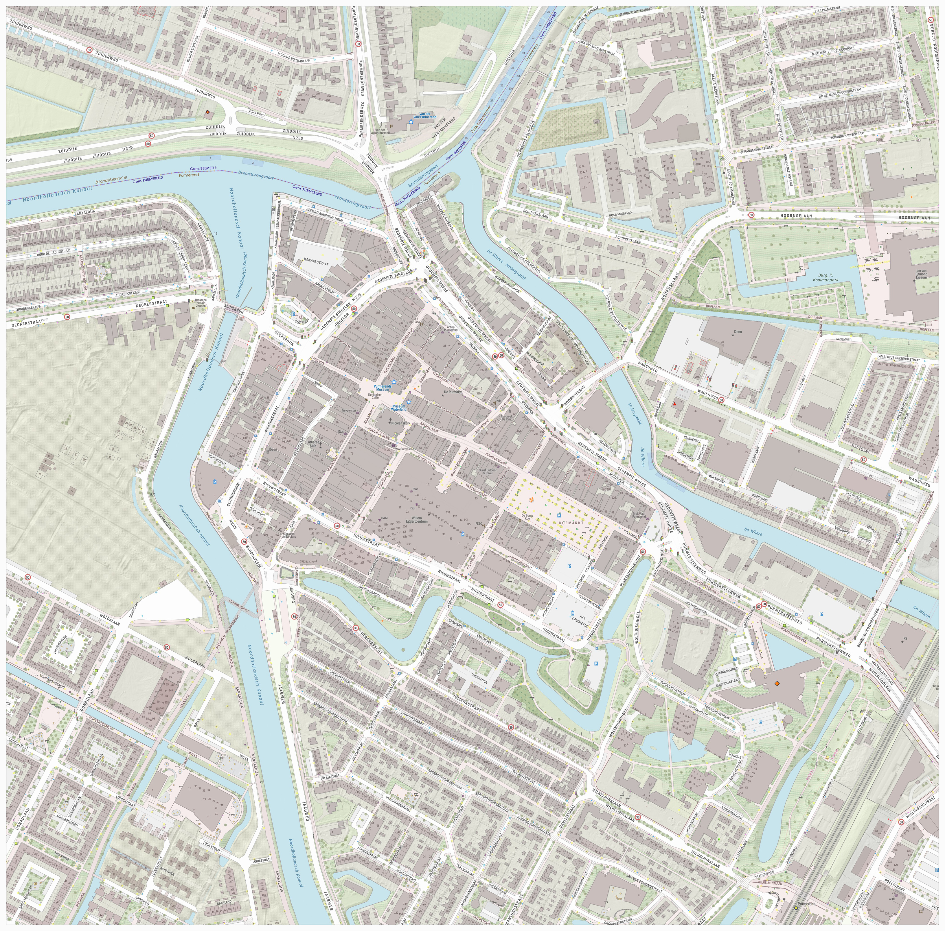 Topografische kaart van Purmerend (centrum van woonplaats). Resolutie: 2688 pixels/km. Kaartbeeld samengesteld uit de open geodata van de Basisregistratie Grootschalige Topografie (BGT), Creative Commons-BY Kadaster, en Top10NL en Top25namen (Basisregistratie Topografie, Kadaster), Creative Commons-BY Kadaster. Gebouwvlakken uit open geodata BAG extract, Creative Commons-BY Kadaster. Wegen uit de OpenStreetMap, CC-BY OpenStreetMap bijdragers. Reliëfschaduw uit de Actuele Hoogtekaart AHN2/AHN3. Samenstelling en kleurenschema: Jan-Willem van Aalst, met QGIS2. Zie ook de Legenda.